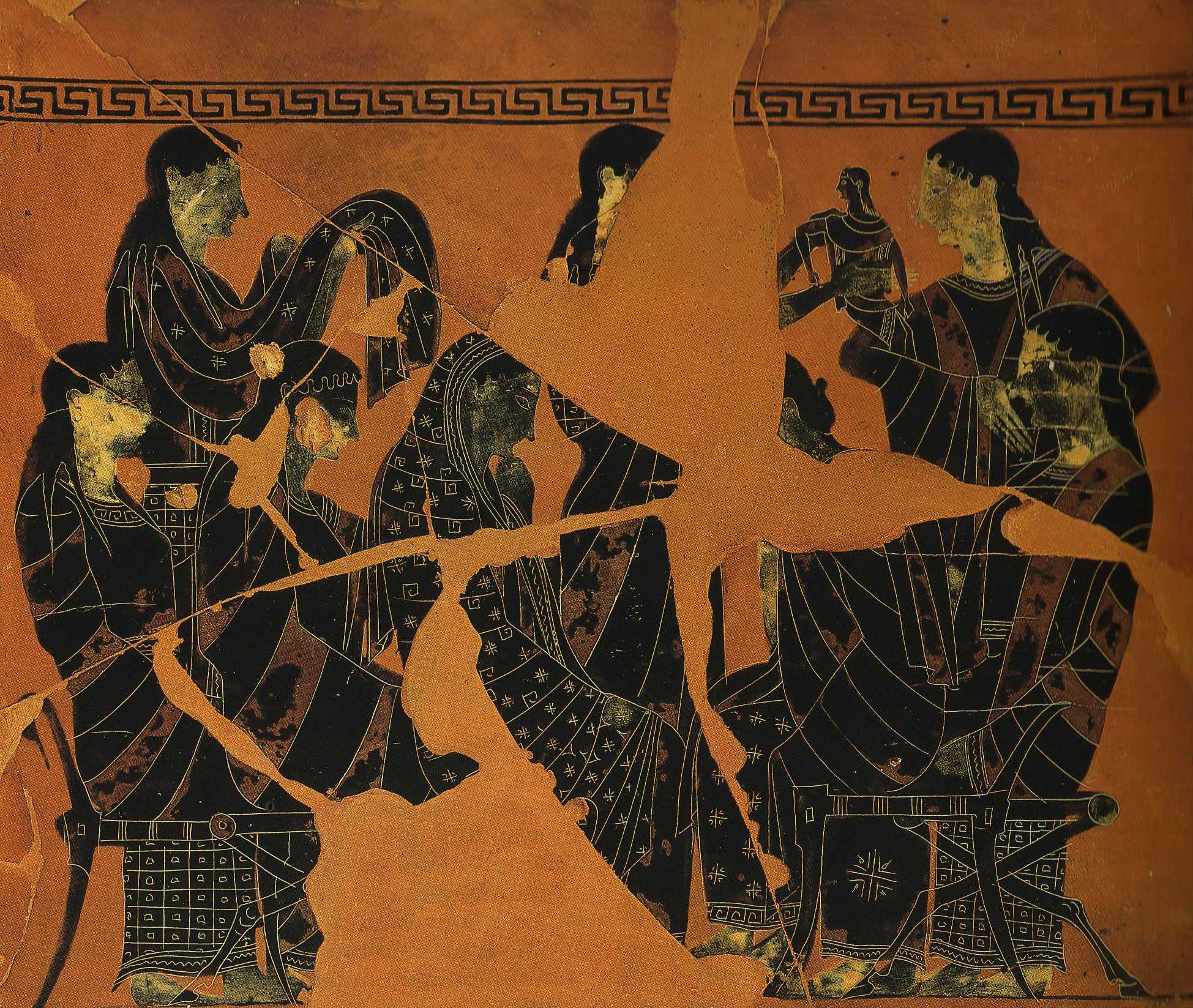 Grabpinakes des Vasenmalers Exekias, eine von 16 im schwarzfigurigen Stil bemalte Tontafeln, eine Prothesis (Totenklage) und einen Totenzug darstellend, gefunden auf dem Kerameikos in Athen, zwischen 540 und 530 v. Chr., 43 × 37 cm, Antikensammlung Berlin